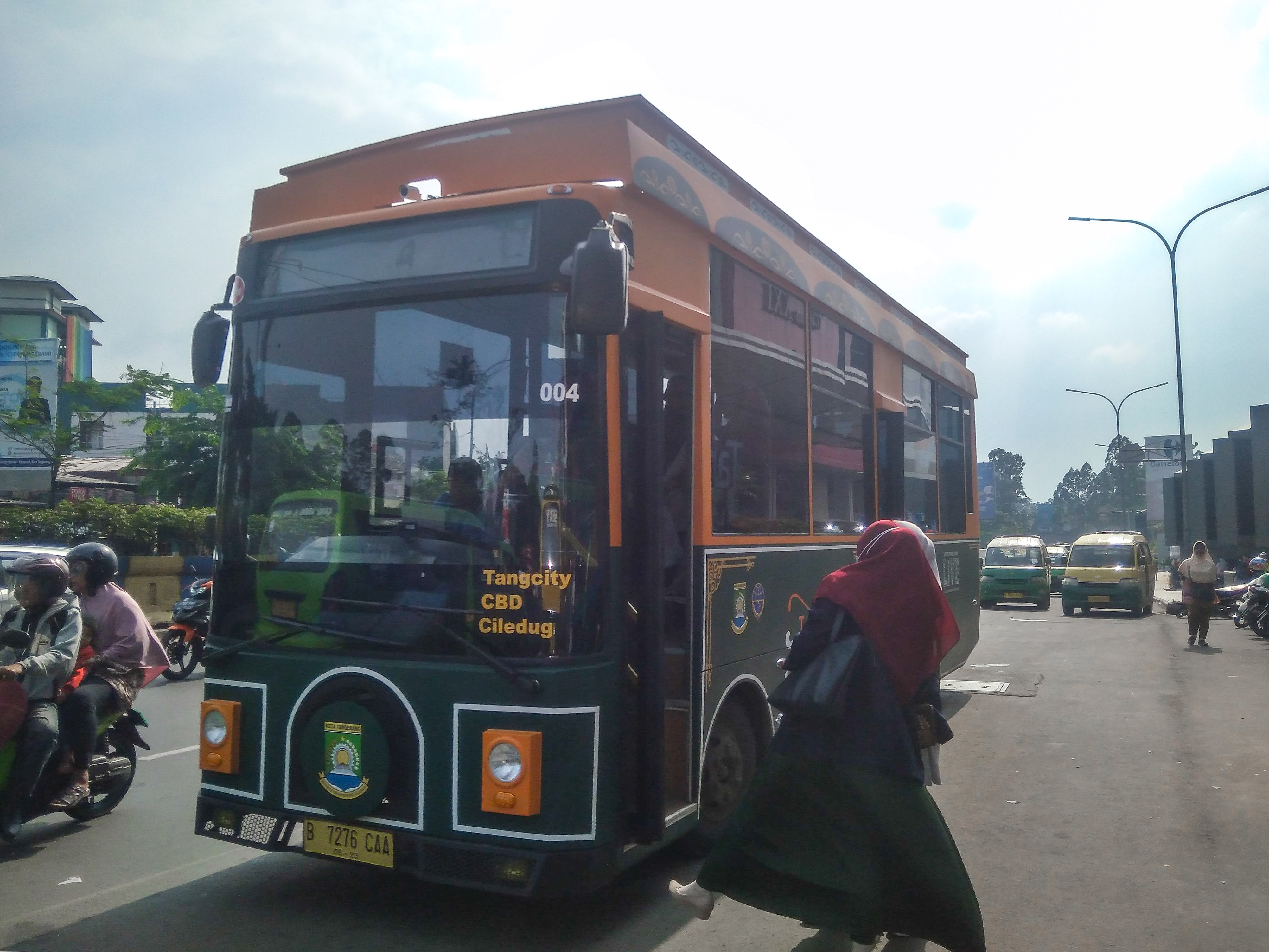 Armada koridor 3 sedang melakukan proses naik-turun penumpang